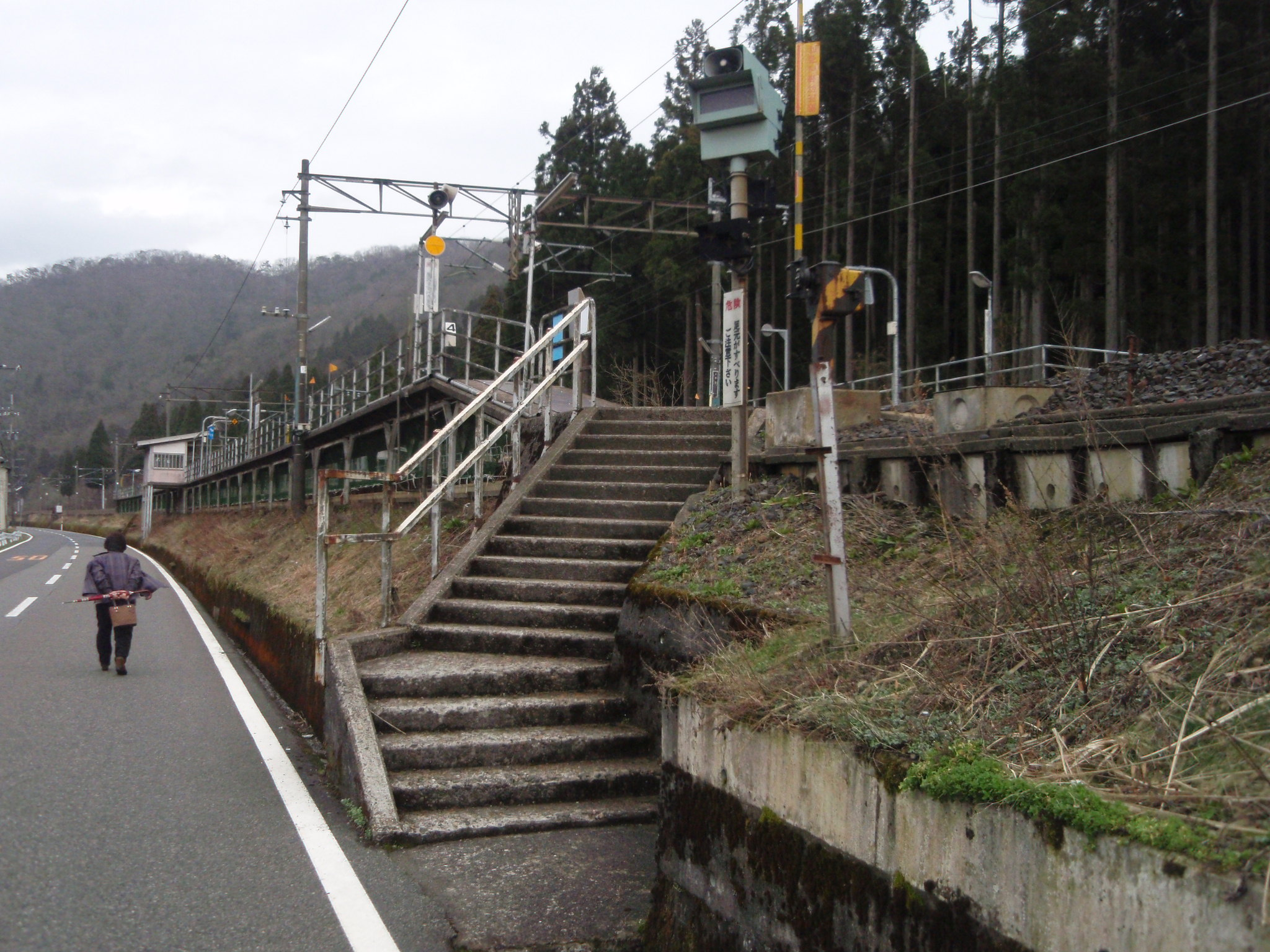 南今庄駅 出入り口